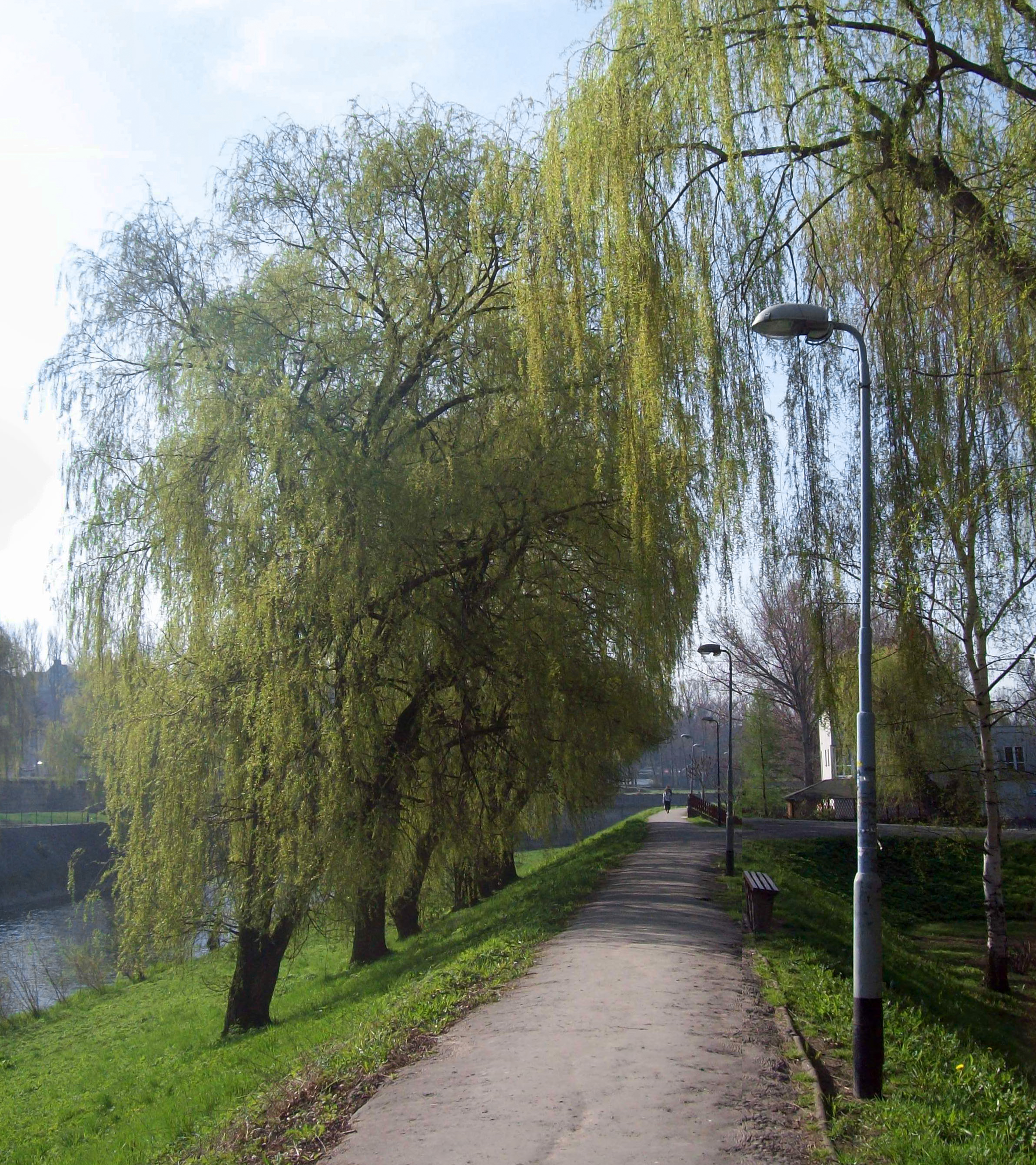 Promenada miejska w Kłodzku nad Nysą Kłodzką